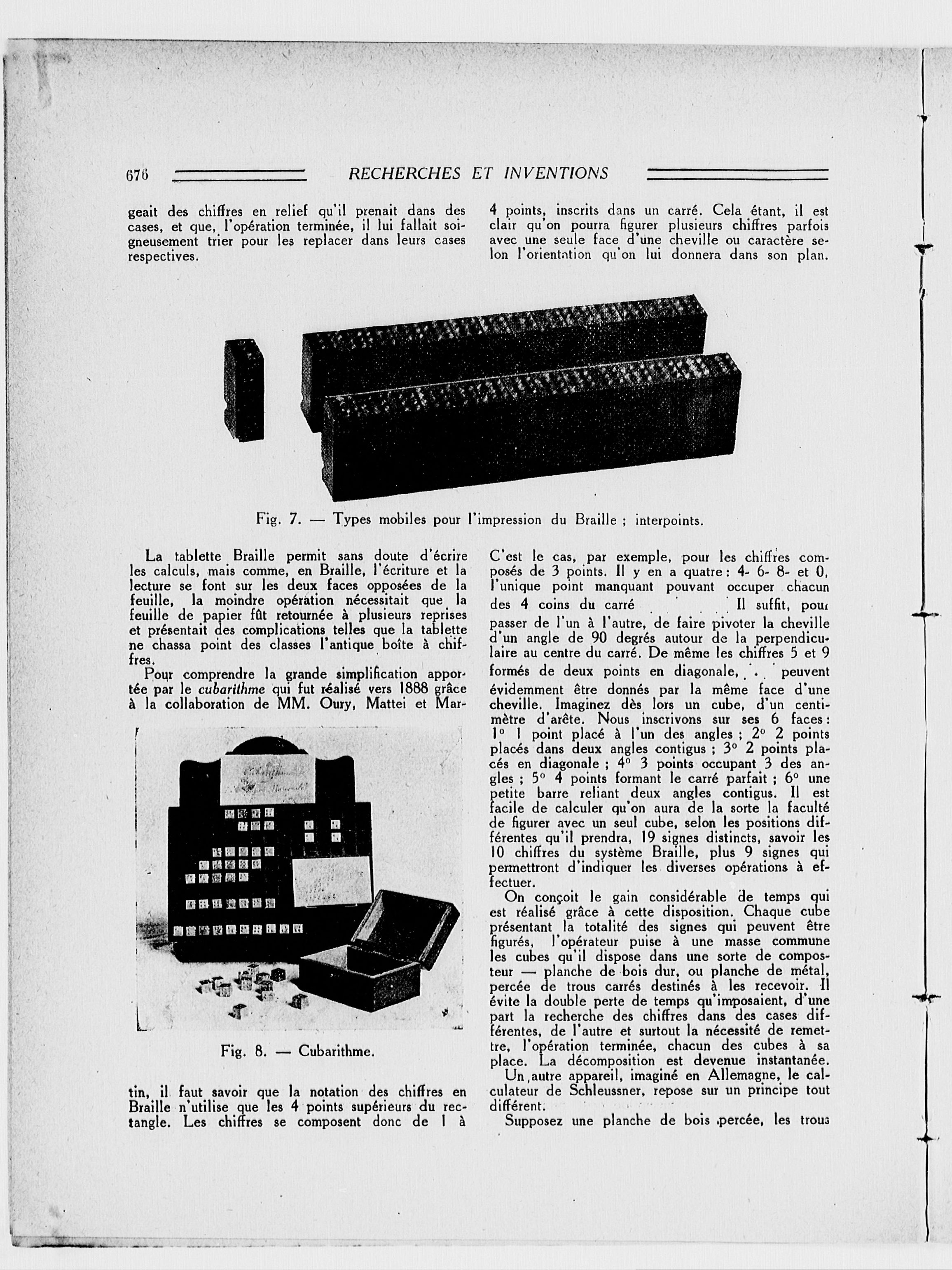 Pierre Villey, professeur à la Faculté des lettres de Caen et secrétaire général de l'Association Valentin Haüy, présente le cubarithme dans un article de la revue paru le 15 octobre 1926. Imprécis sur la date de création et les circonstances de l'invention, il explique les avantages du cubarithme, encore utilisé au XXIe siècle, pour l'apprentissage du calcul pour les aveugles.